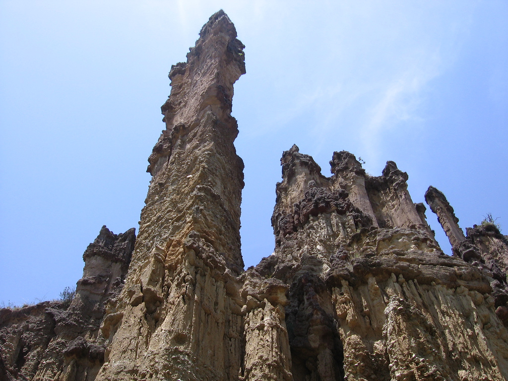 Área Natural Única Los Estoraques, Norte de Santander, Colombia